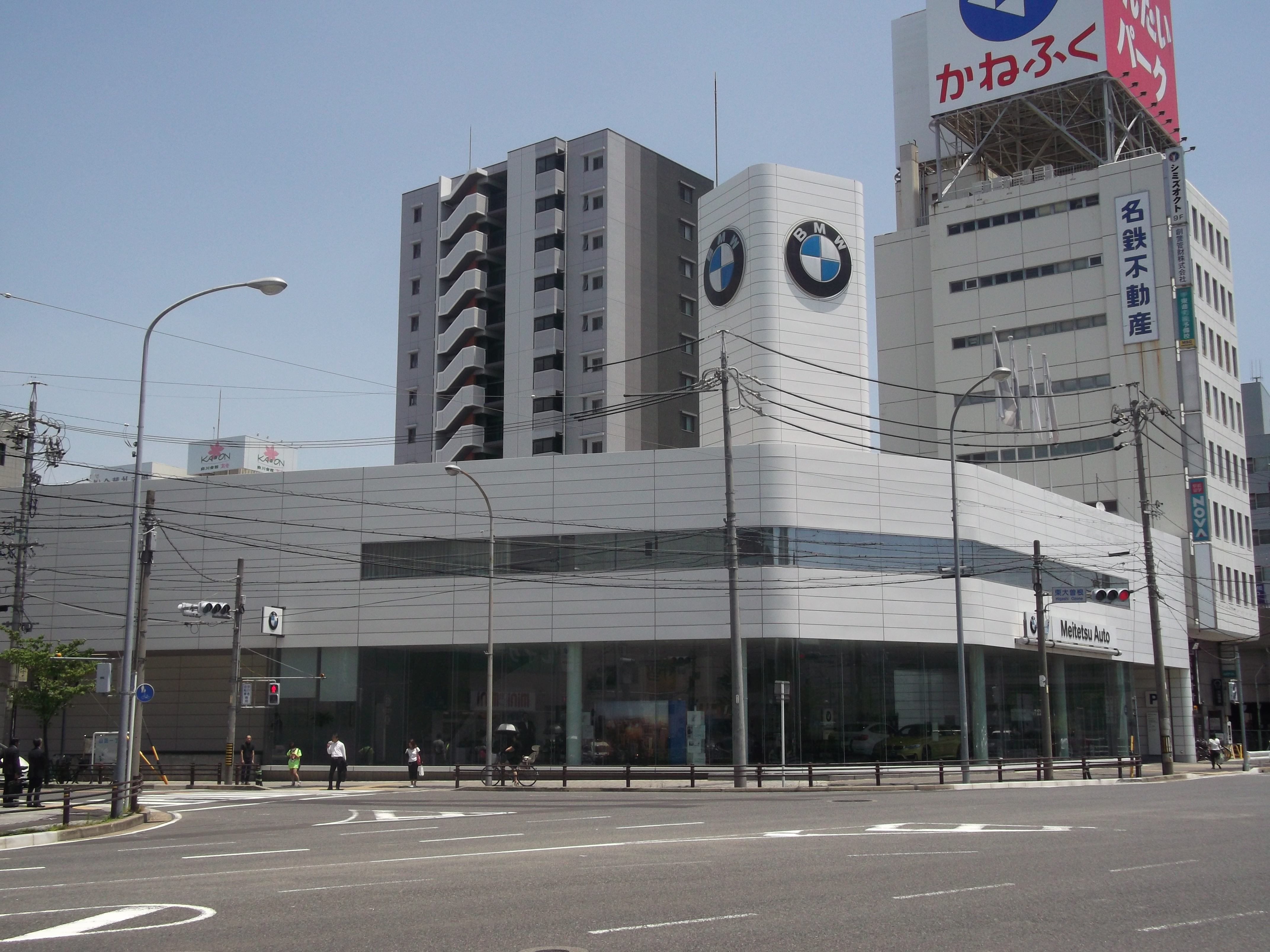 名古屋市北区大曽根の名鉄オート本社を写す